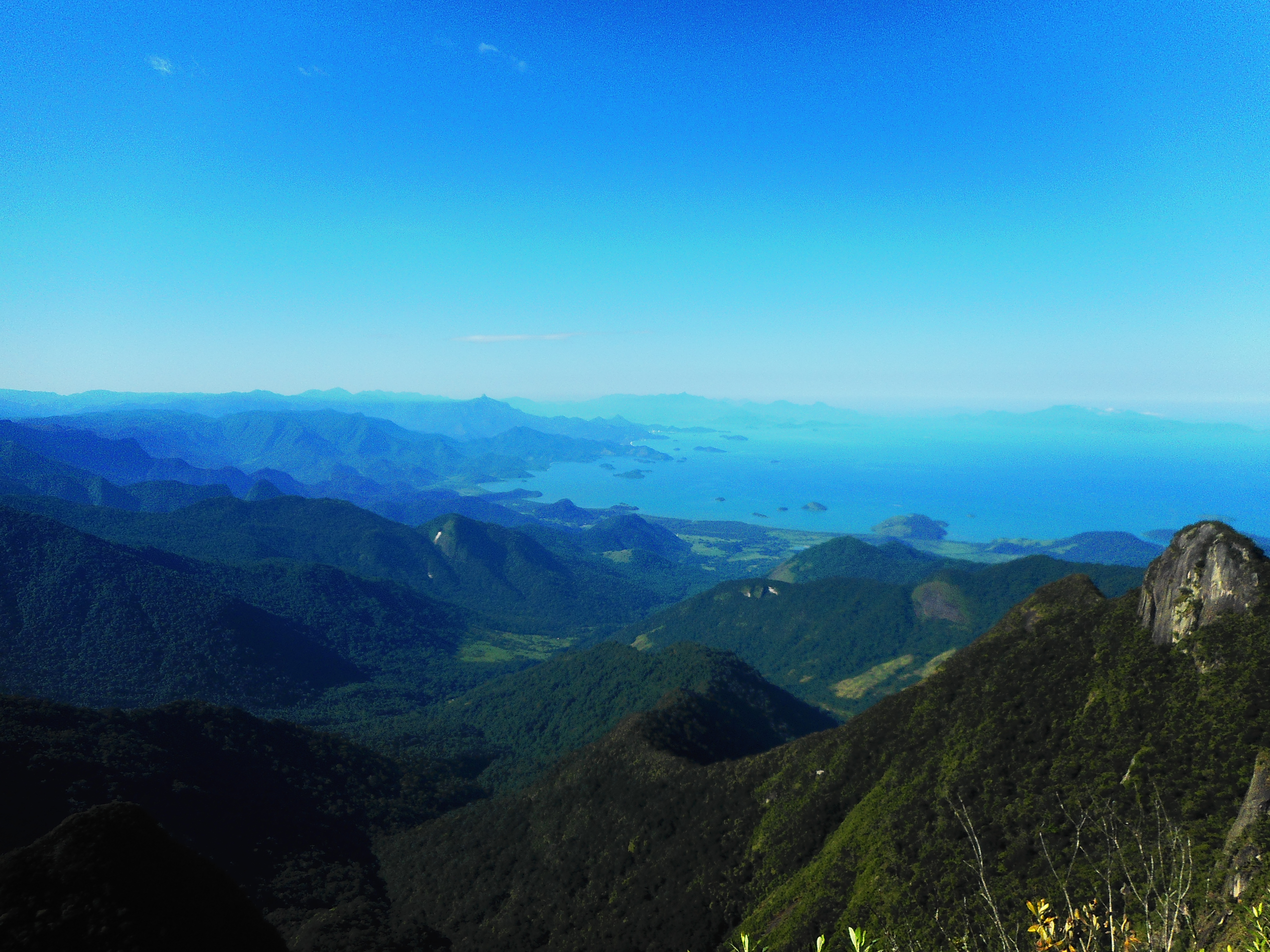 Imagem capturada da Pedra da Macela, que fica situada na estrada Paraty Cunha. Limite do Rio de Janeiro e São Paulo.